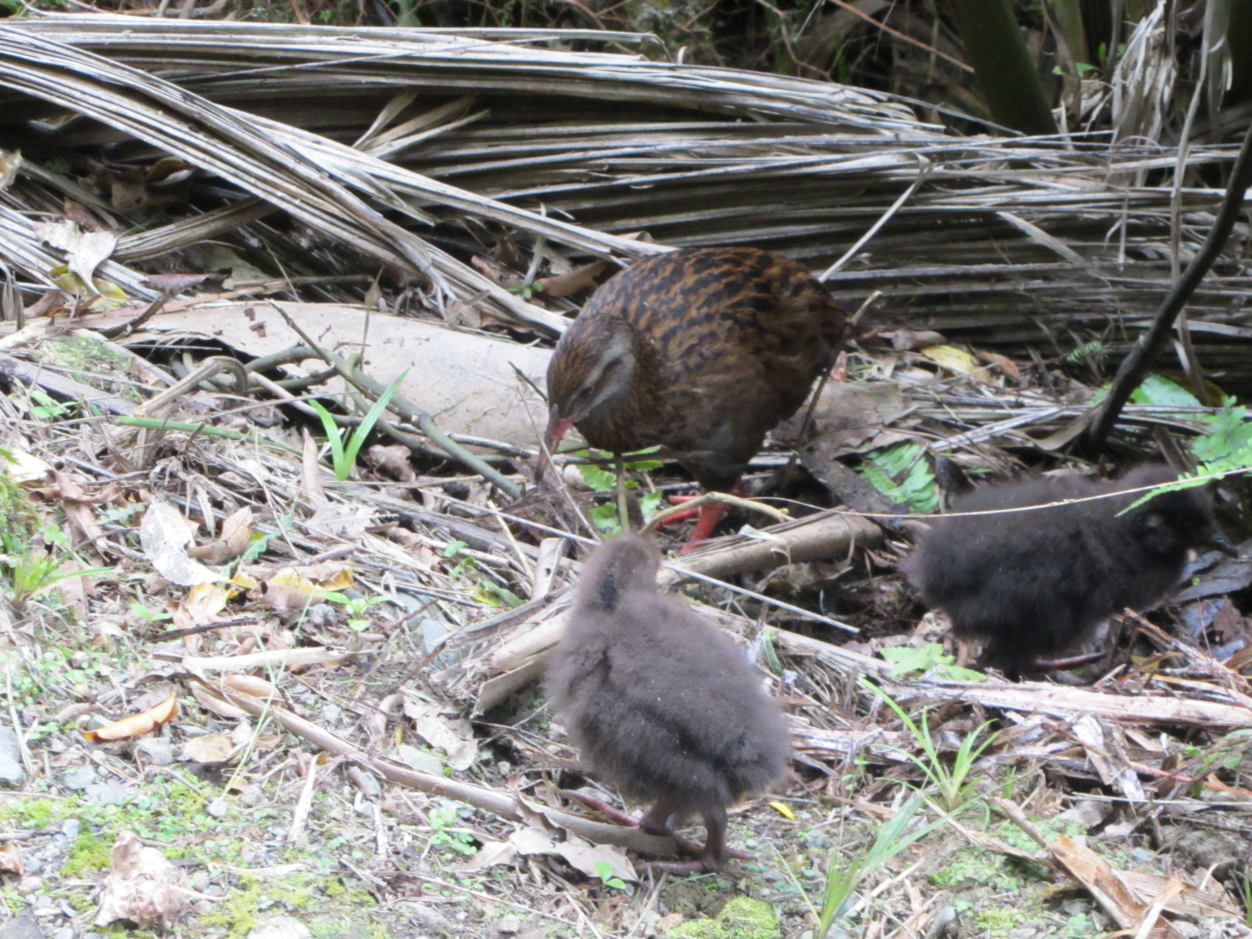 Weka & chicks